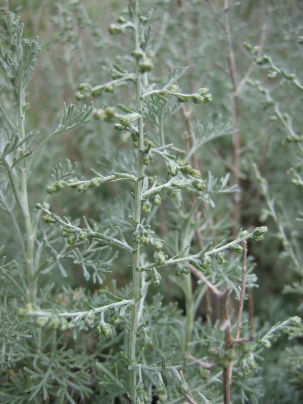 Strand-Beifuß Artemisia maritima, Wismarbucht